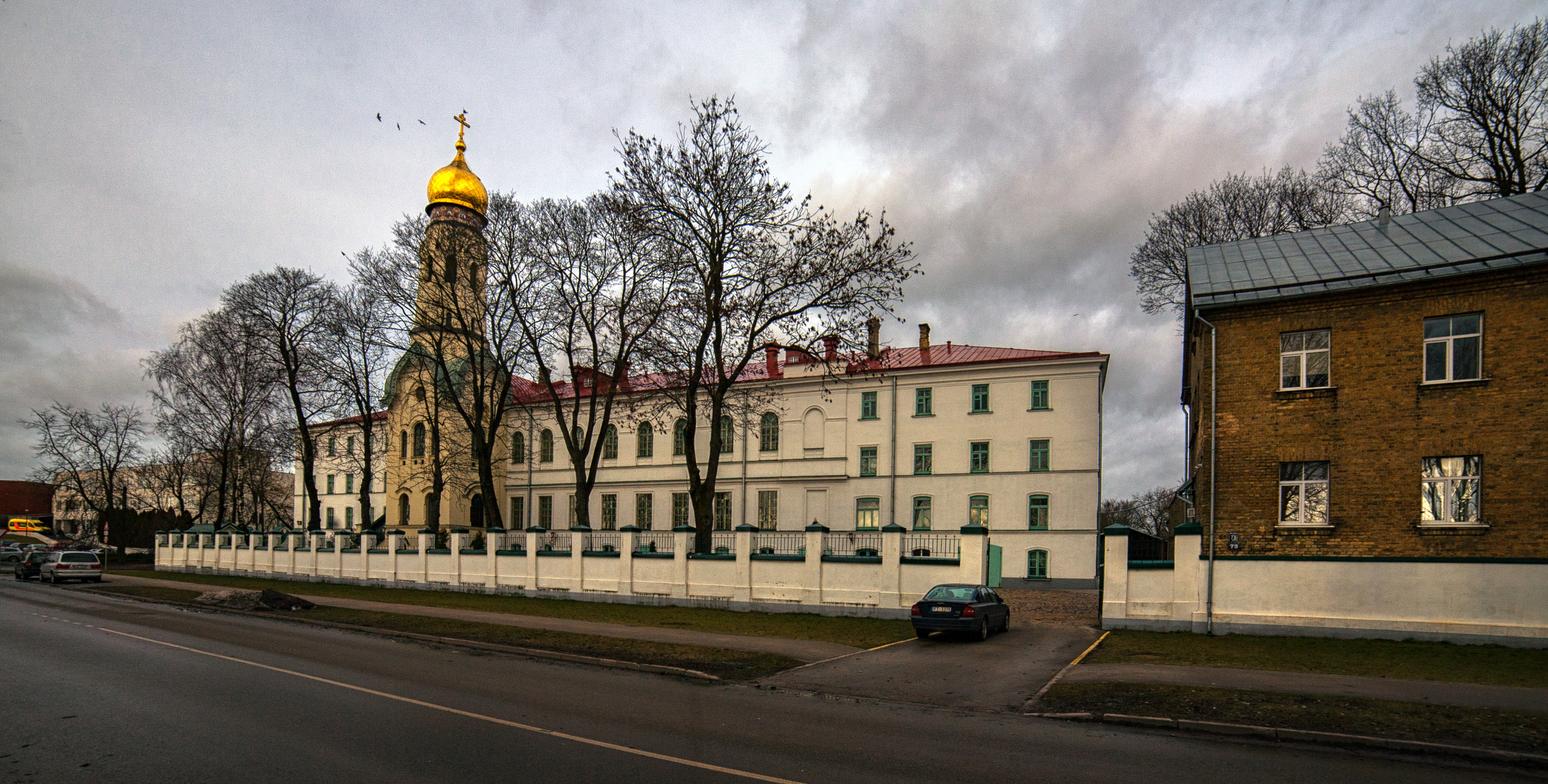 Grebenščikova vecticībnieku kopienas lūgšanu nama ar klosteri apbūve, Rīga, Krasta iela 73